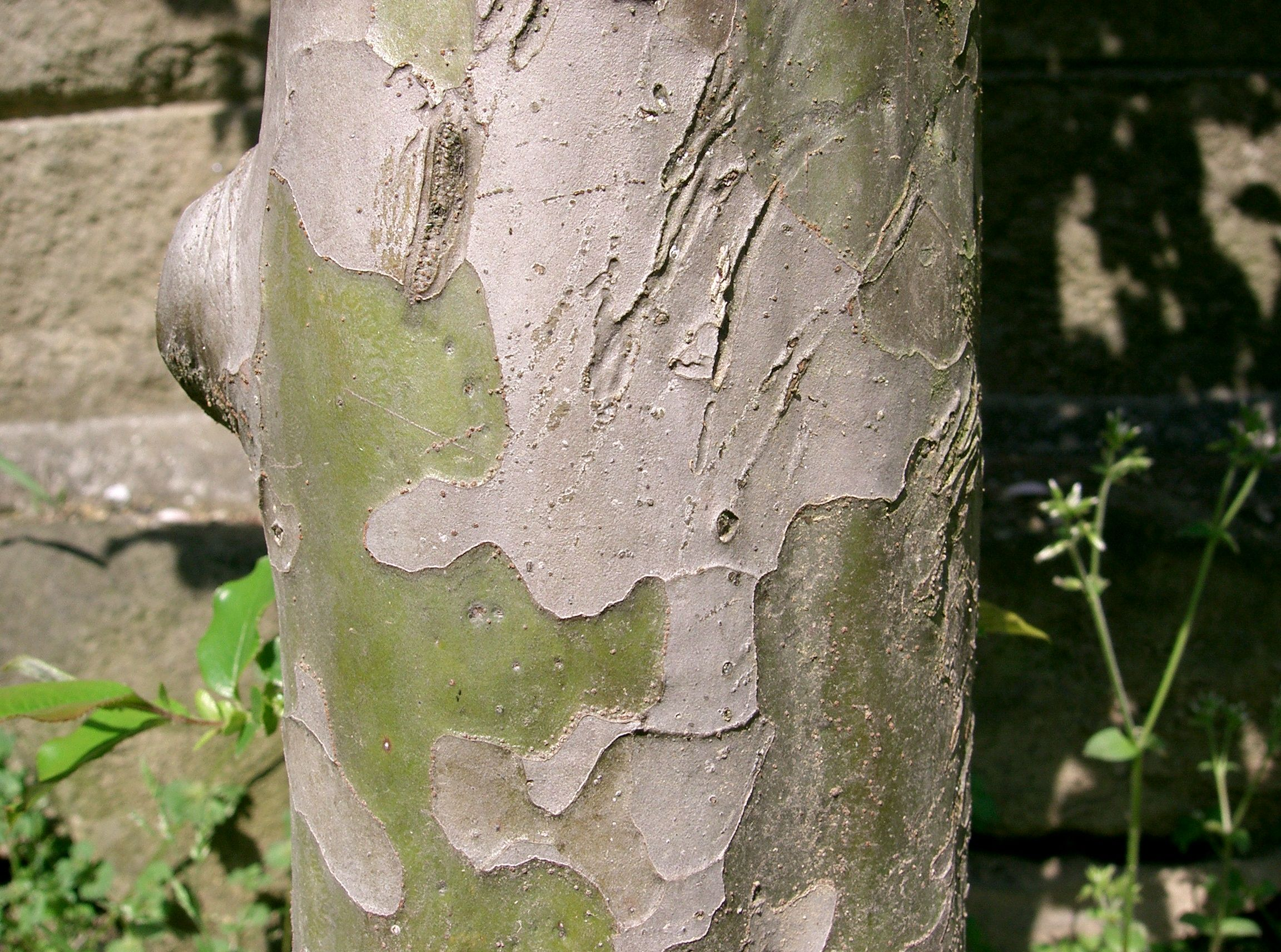 Chaenomeles sinensis